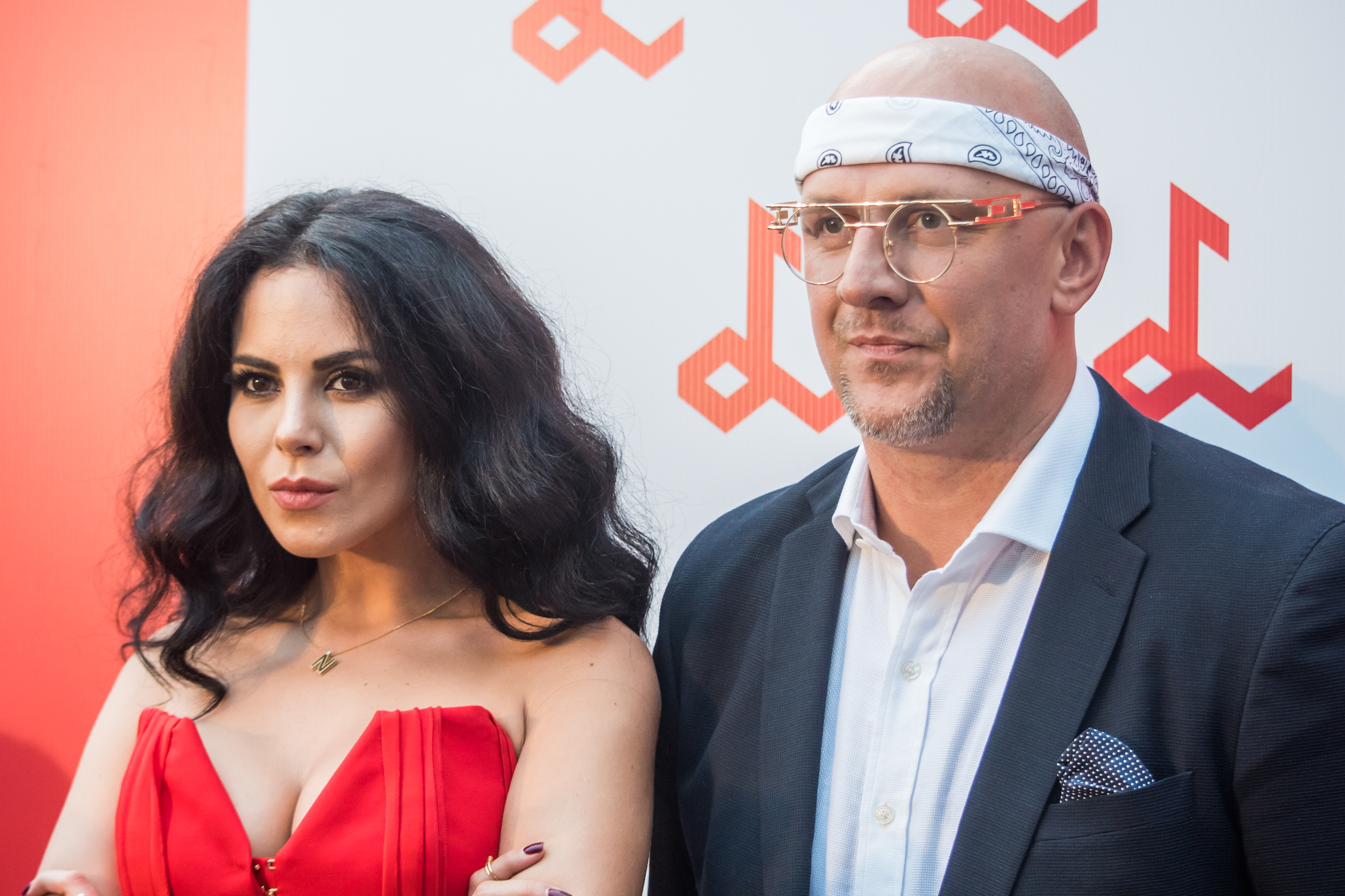 Потап и Настя на фестивале «Лайма. Рандеву. Юрмала 2017»